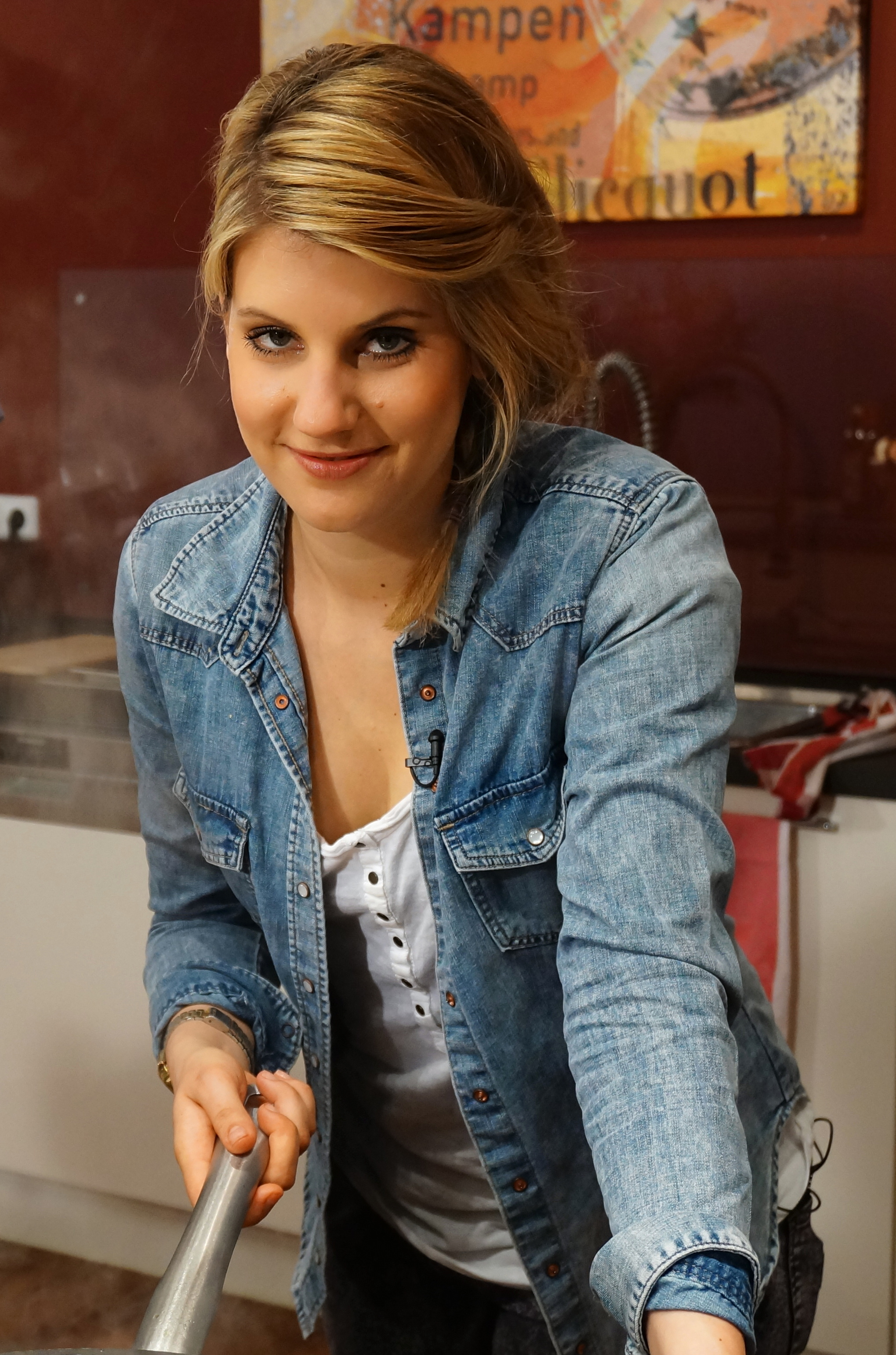 Felicitas Then während der Dreharbeiten für die Fernsehsendung Berlin kocht.